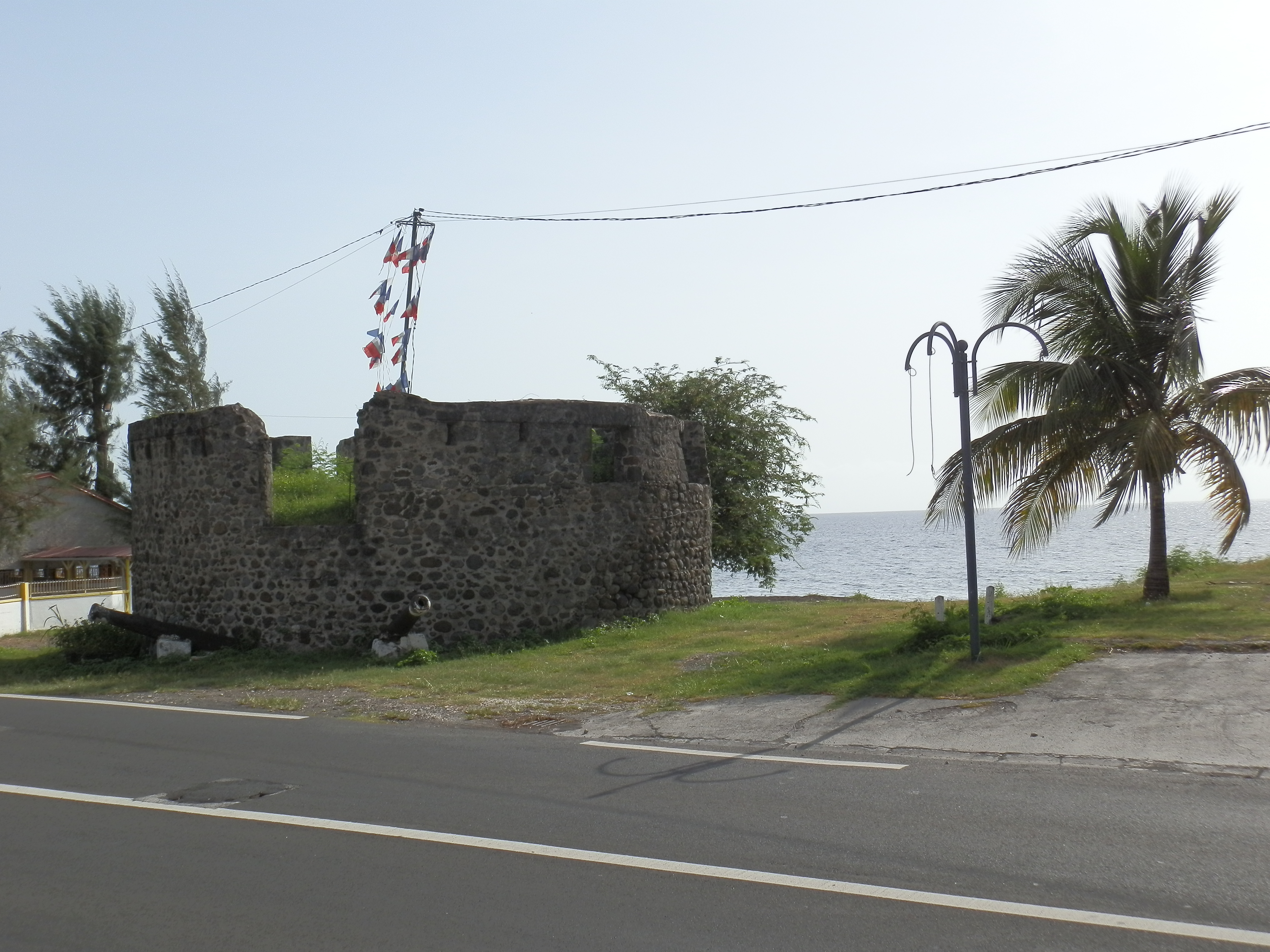 Tour du Père-Labat, (Inscrit, 1979) .